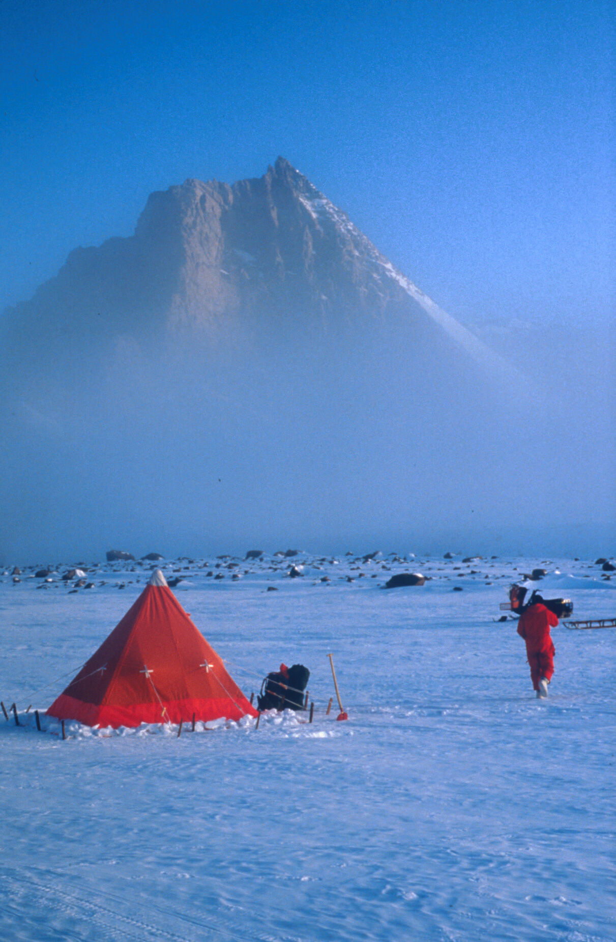 Die Wallnerspitze, Kottasberge, im Nebel